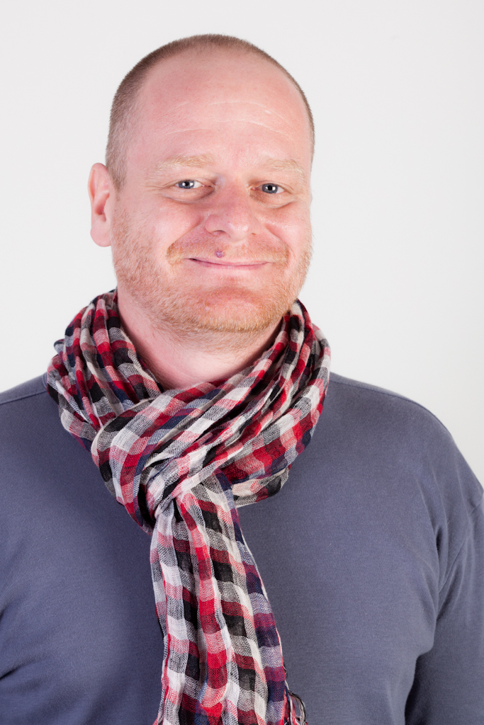 Bernd Schlömer PIRATEN-Mitglied